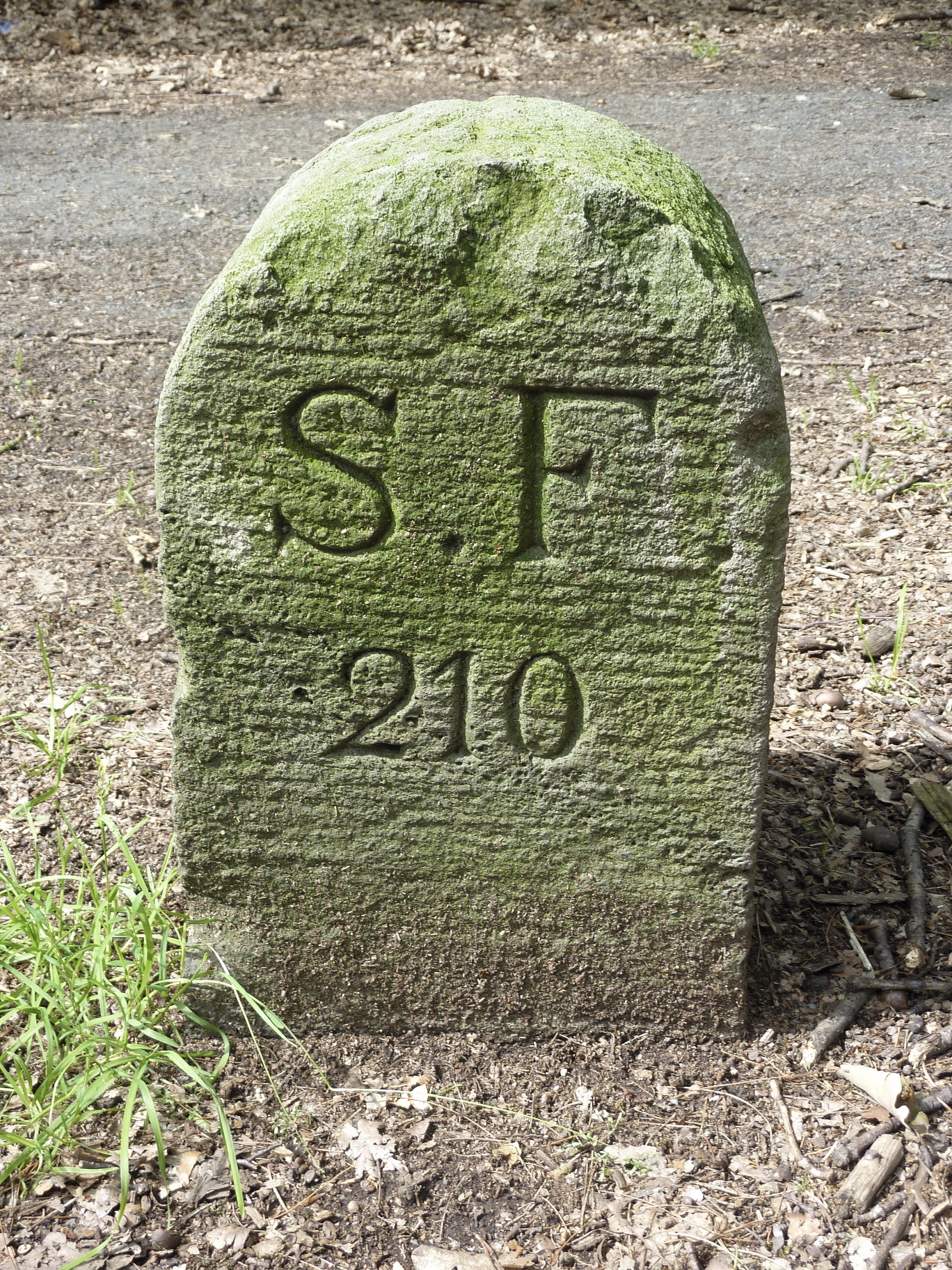 Frankfurt am Main, Frankfurter Stadtwald: Entlang der Kelsterbacher Terrasse, eiszeitliche Abbruchkante des Main-Urstromtals aus dem Erdzeitalter Pliozän, verläuft an deren Oberkante die Grenzschneise. Diese ist ein Abschnitt einer Altstraße zwischen Mainz und Frankfurt. Mehrere Grenzsteine aus dem 19. Jahrhundert markieren entlang der Schneise die ehemalige Grenze zwischen den Waldgebieten der Freien Stadt Frankfurt im Süden (Unterwald) und dem damals zum Herzogtum Nassau gehörenden Dorf Schwanheim (Schwanheimer Wald), im 20. Jahrhundert nach Frankfurt eingemeindet. Das Foto zeigt einen der Grenzsteine mit der Markierung S.F. für Stadt Frankfurt